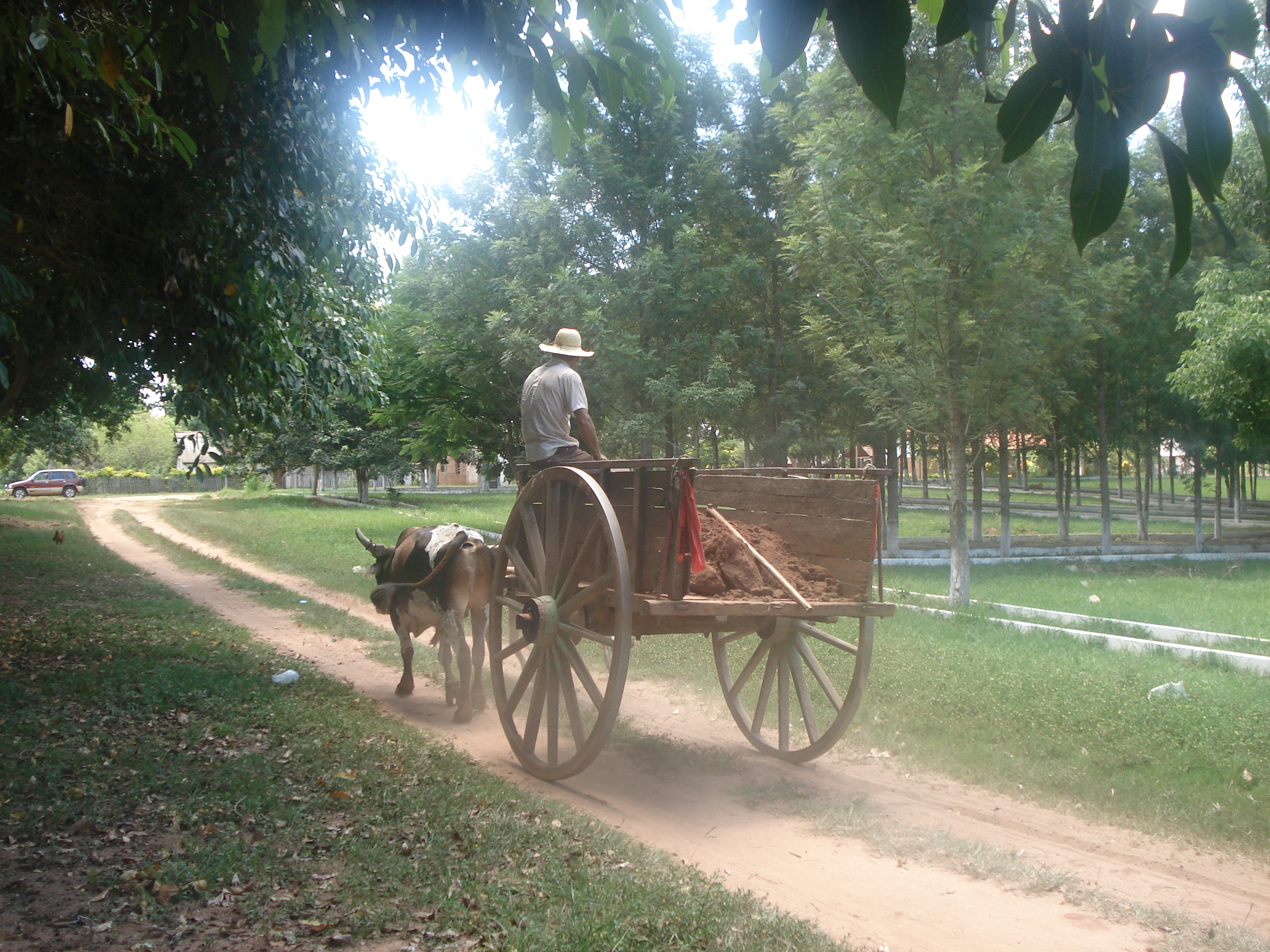 carretera